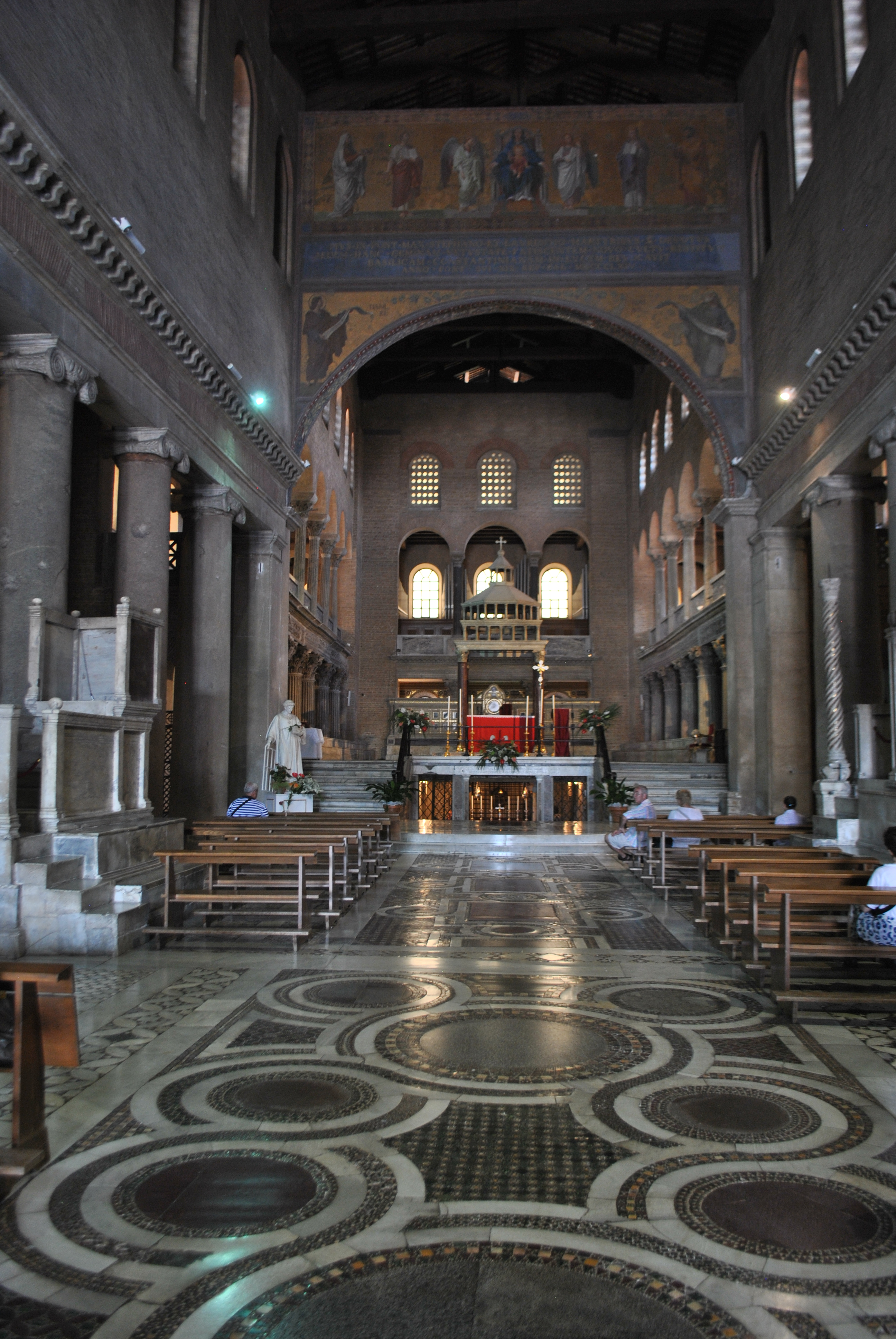 Nave principal da Basílica de São Lourenço Fora de Muros, Roma, Itália